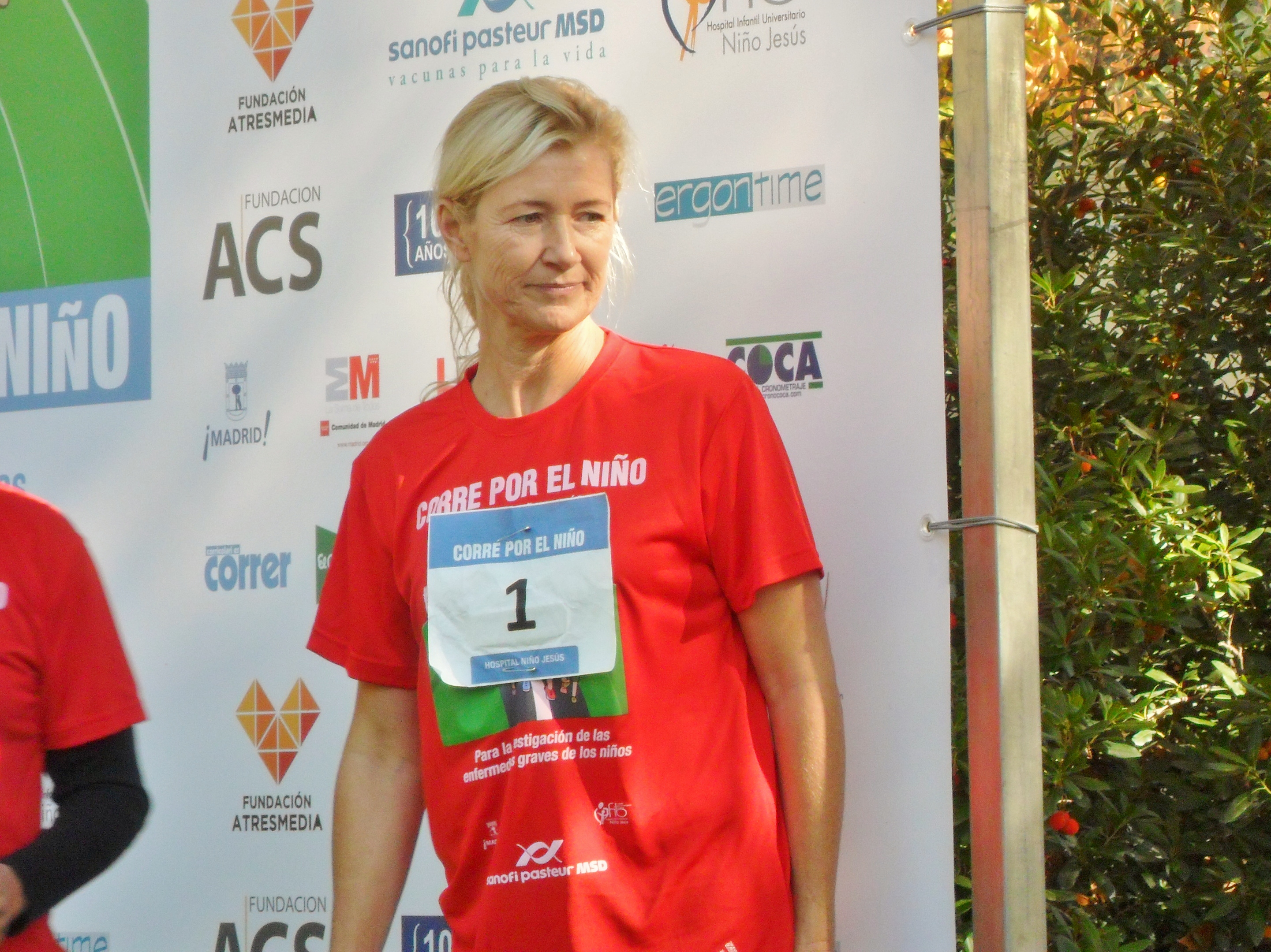 Fotografía de Ana Duato posando en la llegada de la 3ª carrera popular «Corre por el Niño», celebrada en el Parque del Retiro (Madrid) el 27 de octubre de 2013.